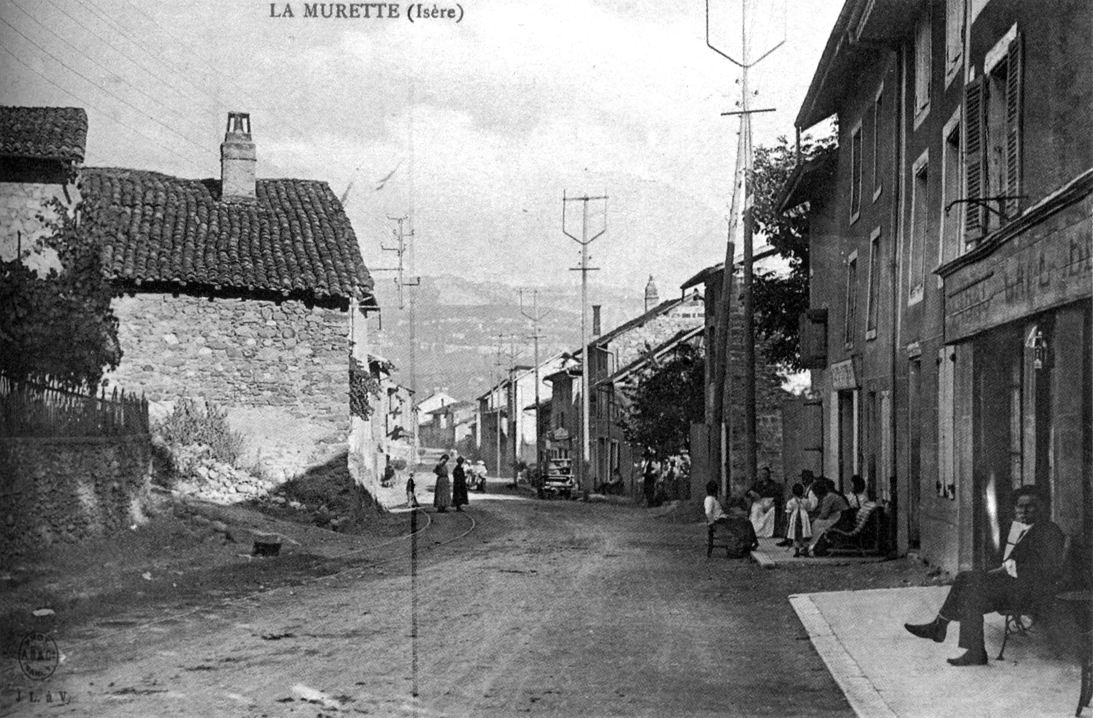 La Murette en 1908